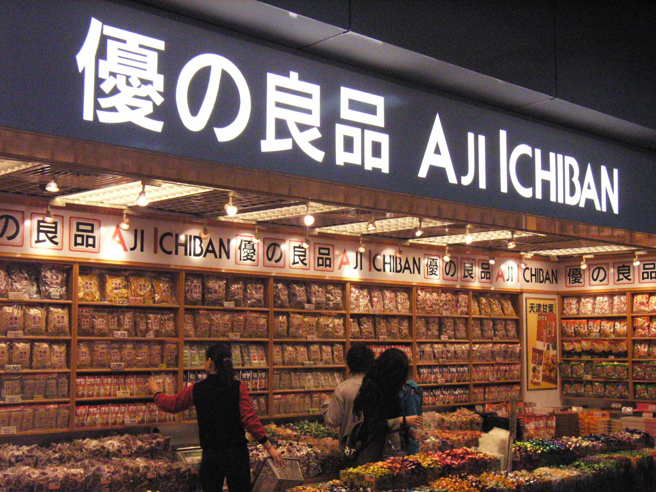 By Annie Parks 優之良品 (Aji Ichiban) 位於香港東涌線香港站的分店。